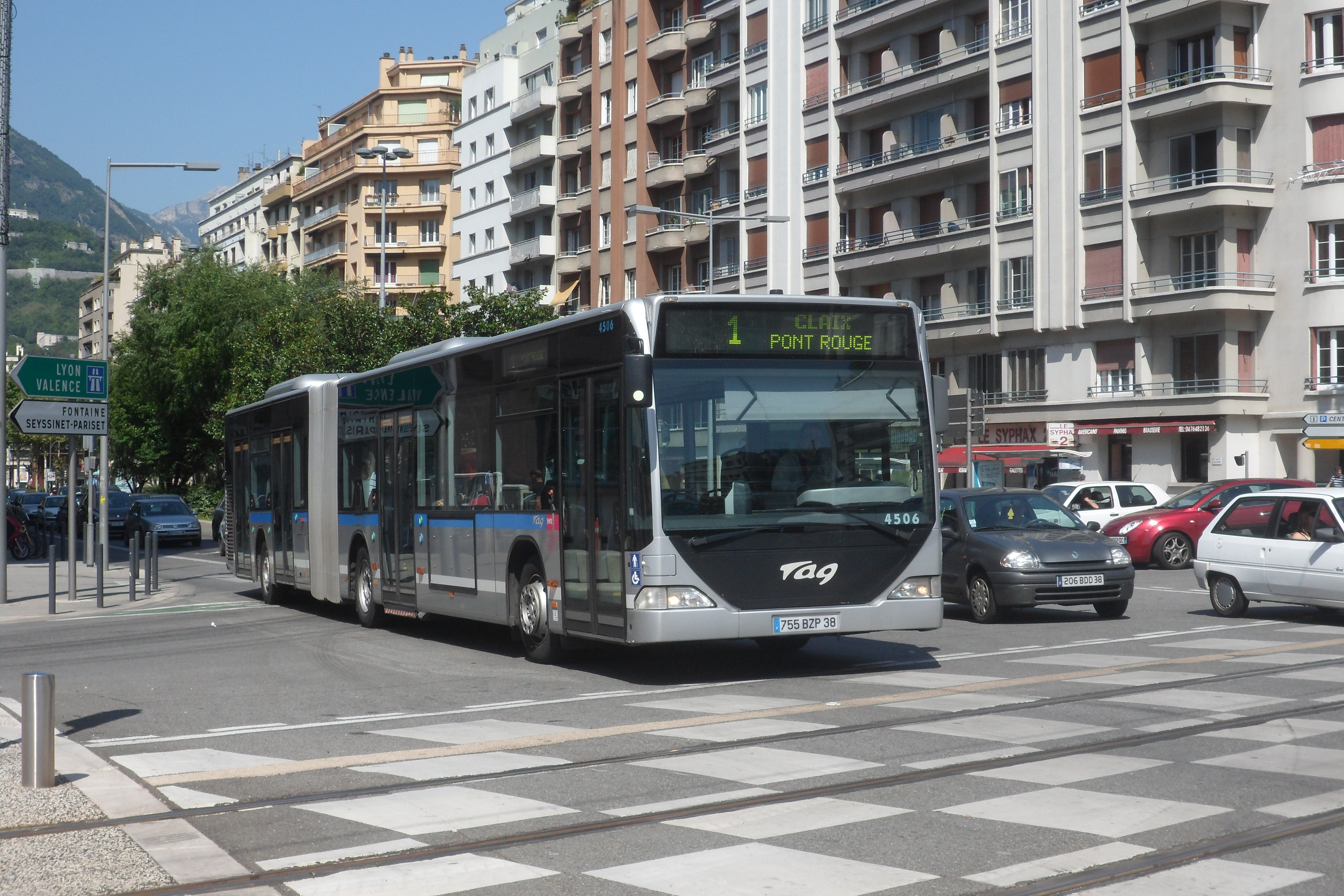 Mercedes Citaro G n°4506 - Réseau TAG - Grenoble